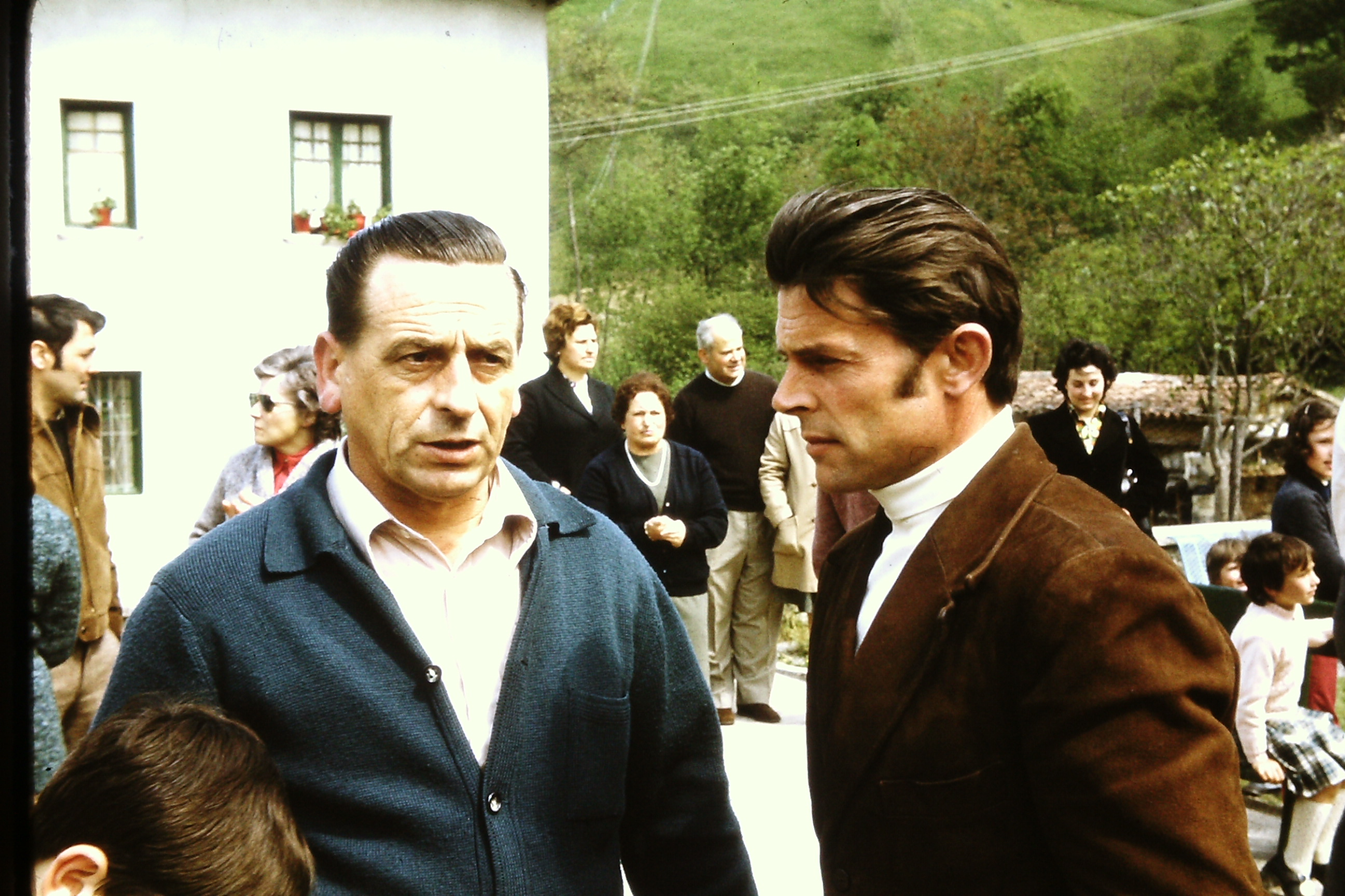 Patxi Etxeberria eta Koxme Lizaso bertsolariak